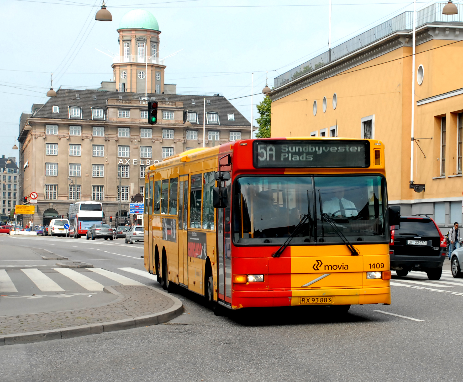 Arriva bus 1409 van het type Volvo B10BLE-60/Aabenraa te Kopenhagen.